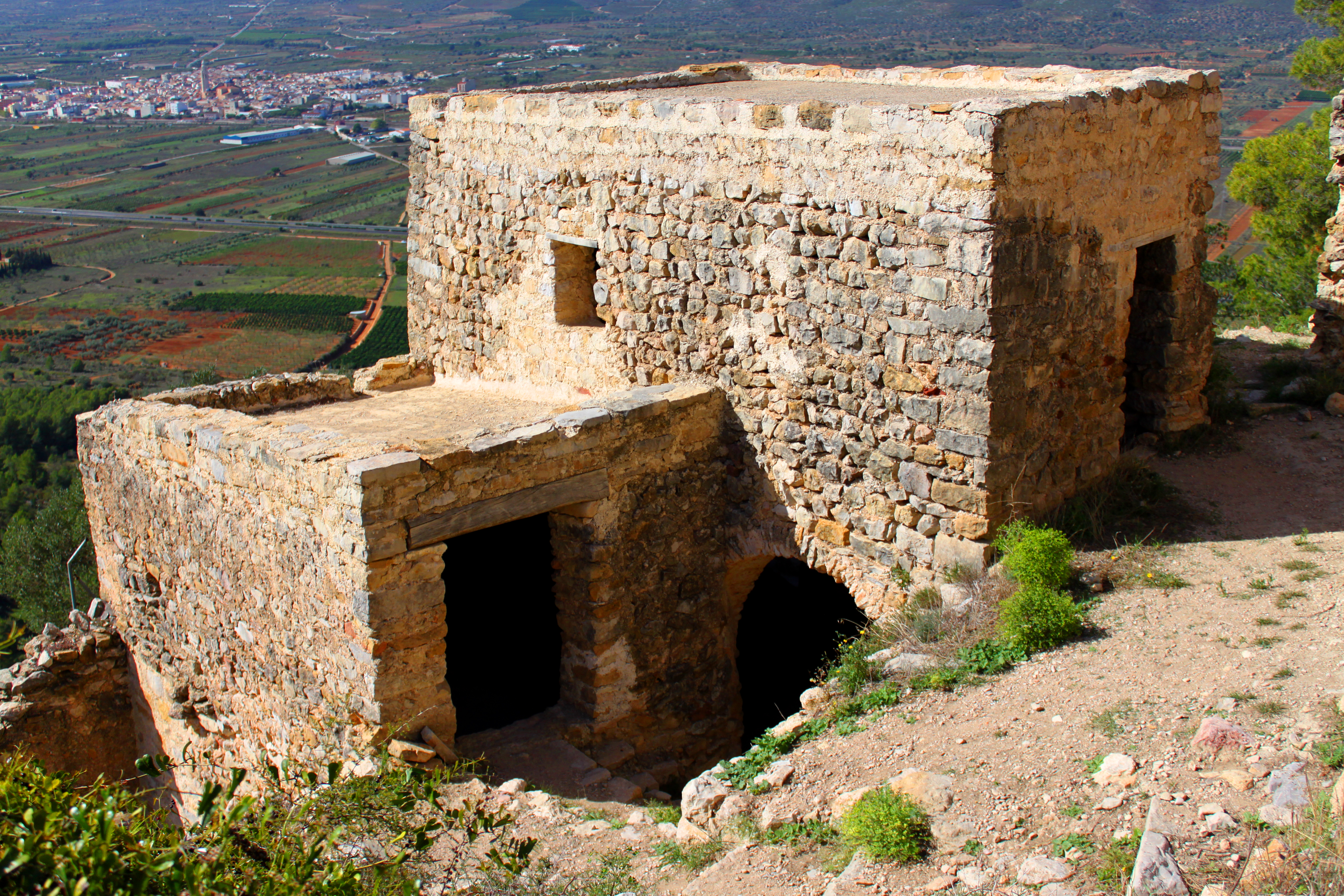 Castillo de Xivert. Vista de la medina andalusí con tres viviendas parcialmente reconstruidas. Las viviendas, que originalmente se encontraban en la cima del cerro del castillo, fueron desmanteladas con posterioridad a la toma de la fortaleza para que ésta pudiera ser ampliada. De este modo la población tuvo que trasladarse en el siglo XIII a la falda oeste del cerro. Alcalá de Xivert, provincia de Castellón, Comunidad Valenciana, España.